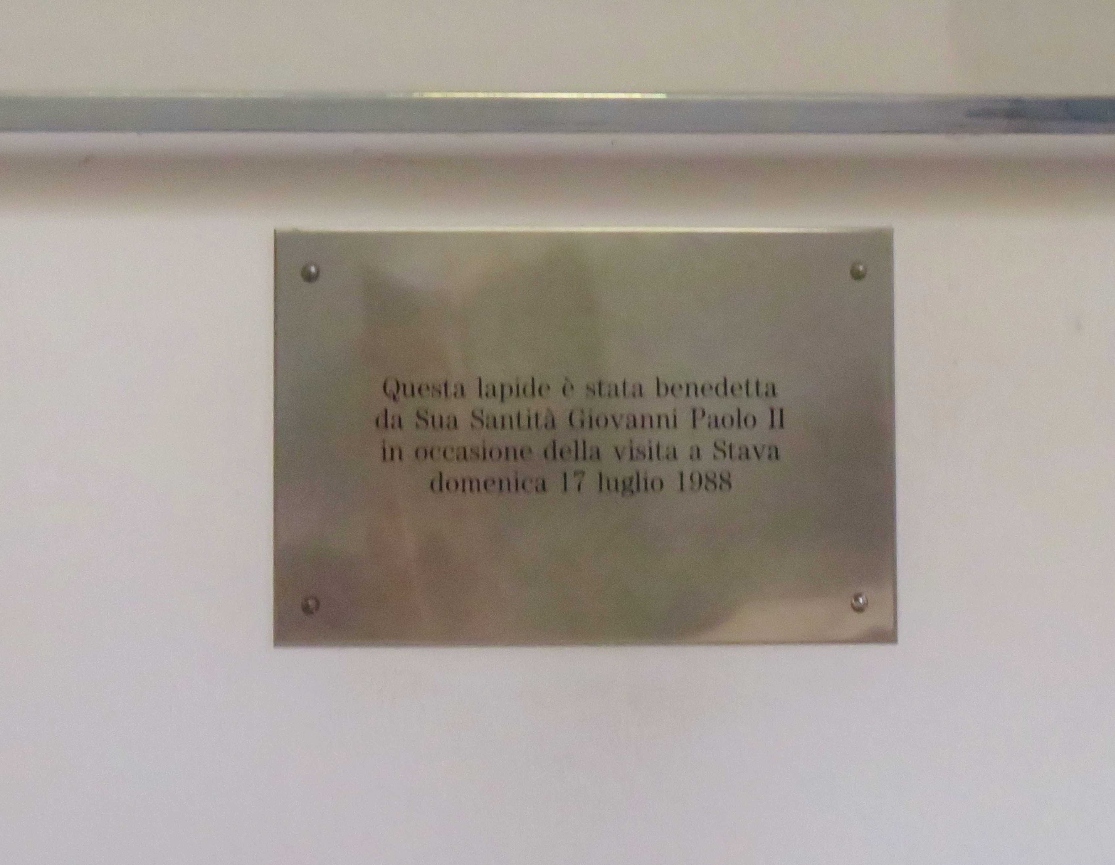 Chiesa della Palanca, o Chiesa della Addolorata, interno. Targa a ricordo della visita di Giovanni Paolo II